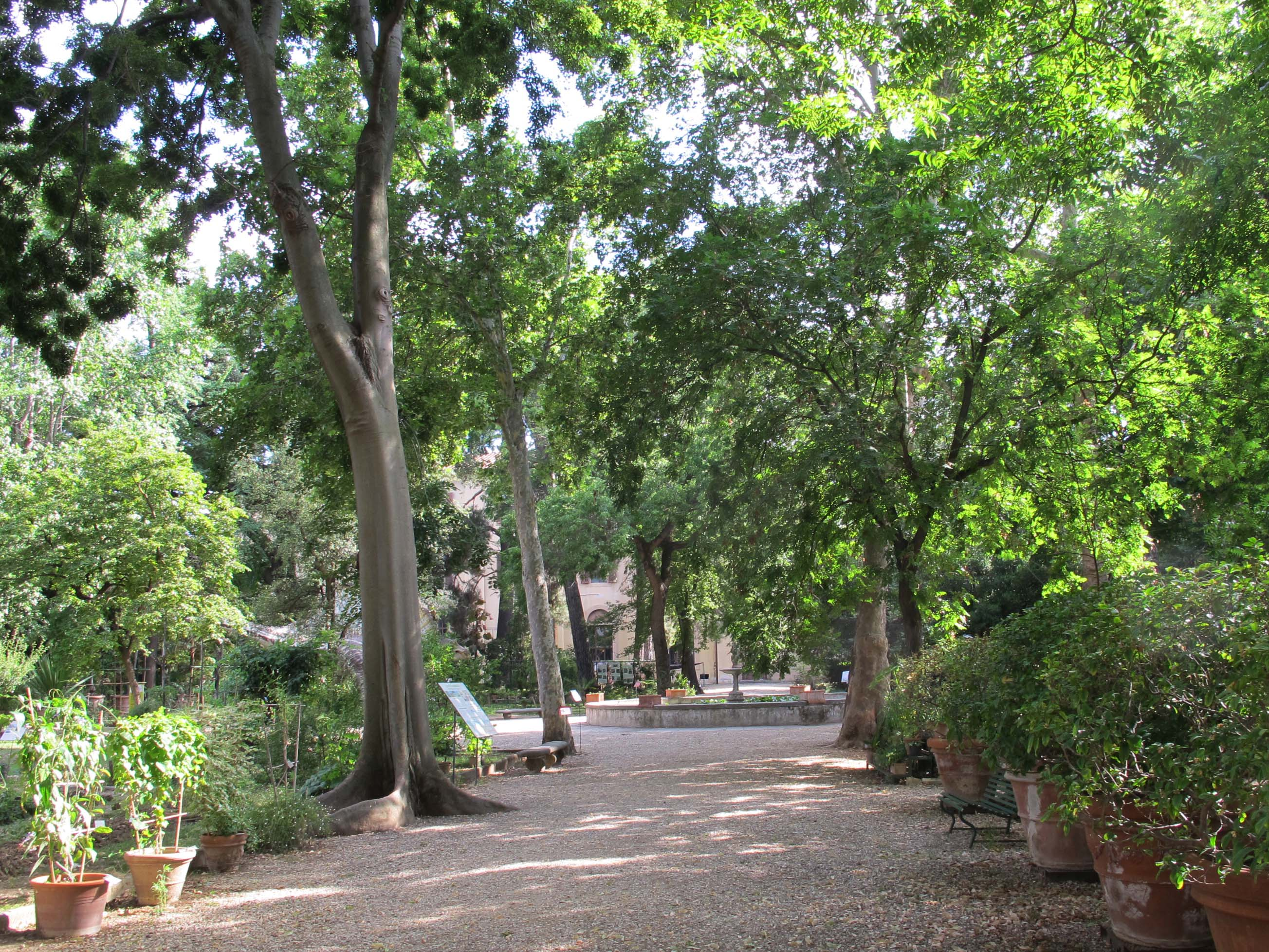 Giardino dei semplici, vialetto